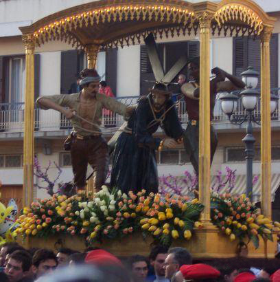 S.S Cristo con la Croce di Ispica, venerato il Venerdì Santo nella basilica della S.S. Annunziata